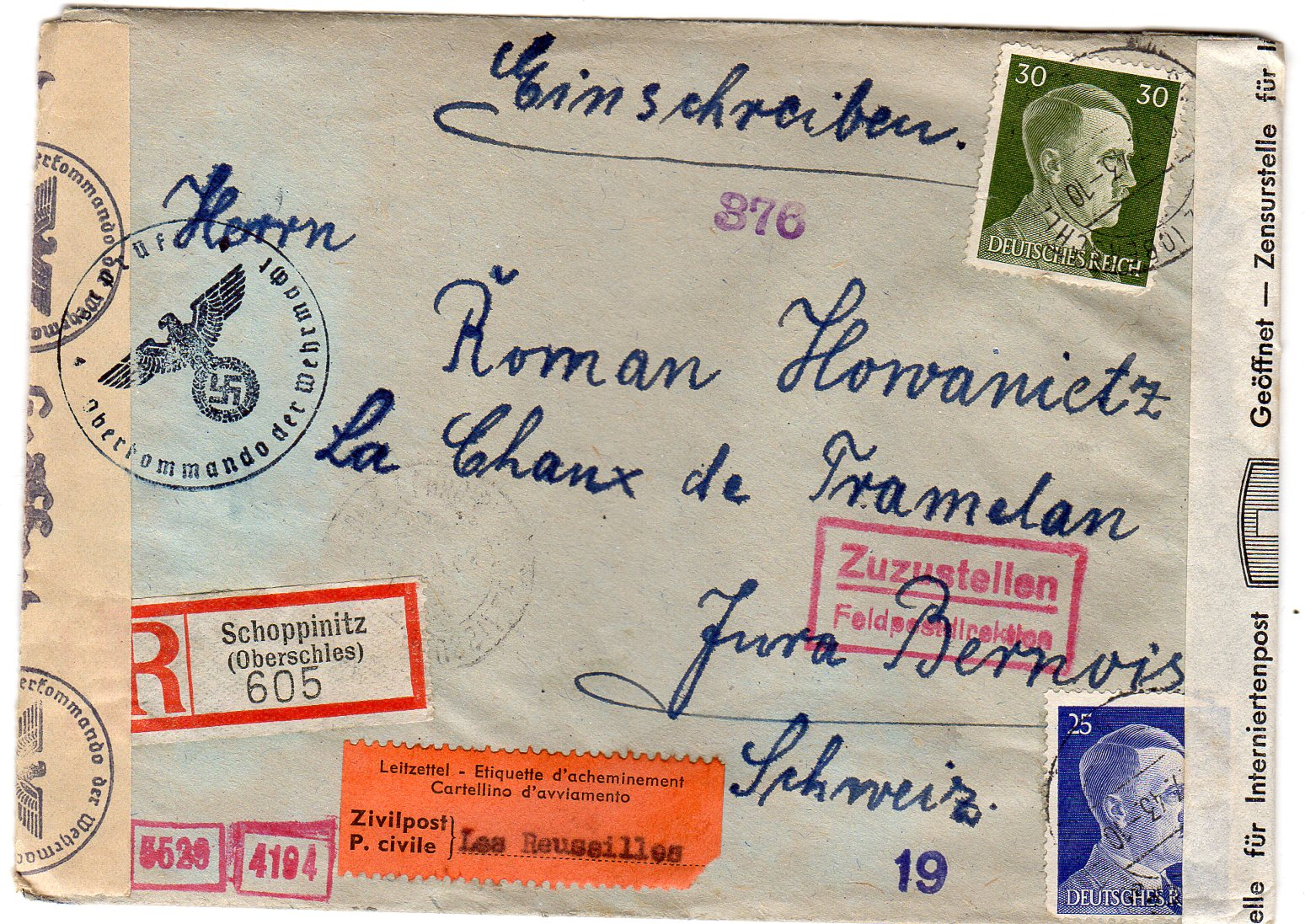 Brief an einen während des Zweiten Weltkriegs in der Schweiz internierten Polen. Zensiert durch Deutschland und die Schweiz. Weitergeleitet